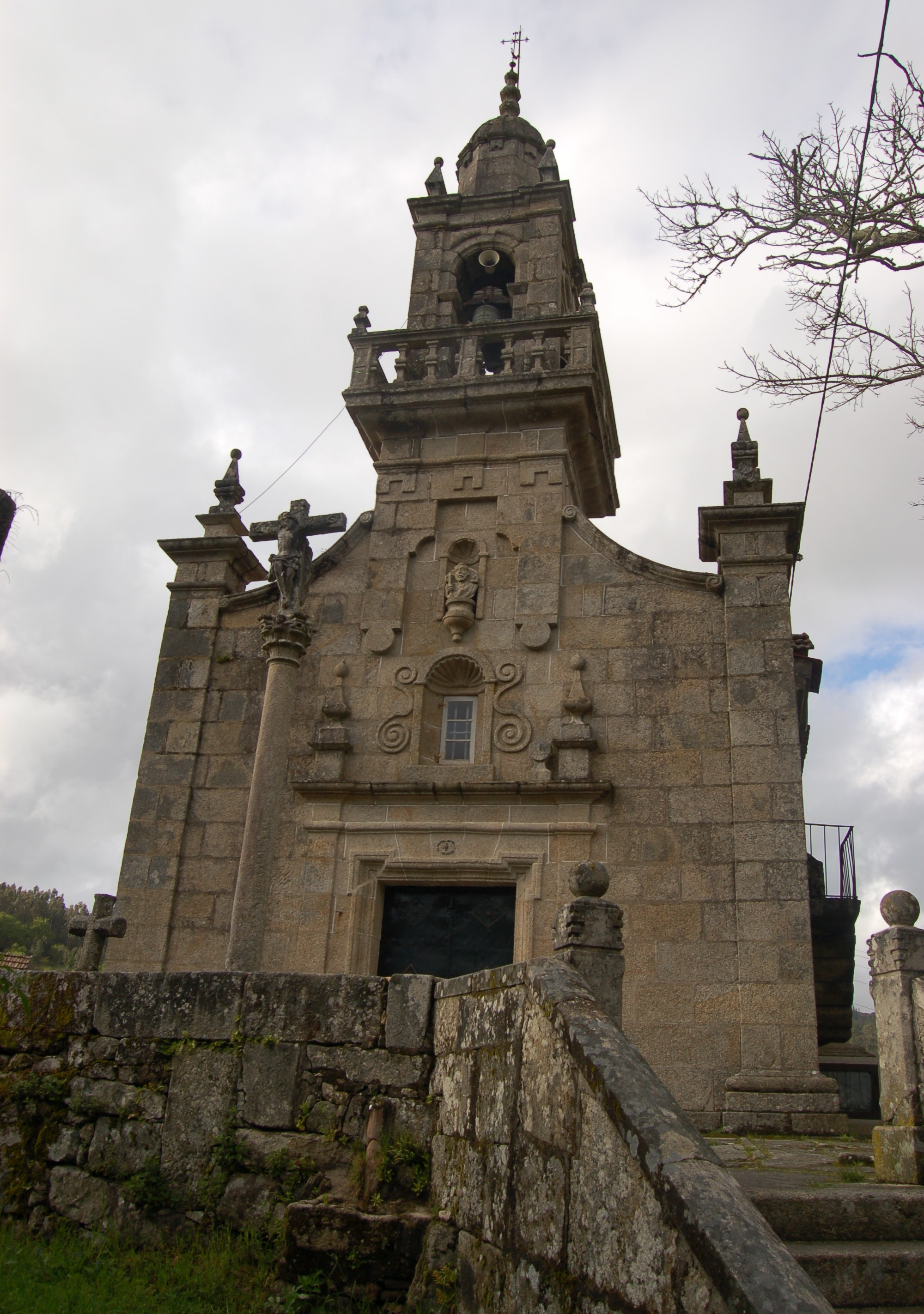 Igrexa parroquial de San Pedro de Gaxate (A Lama)